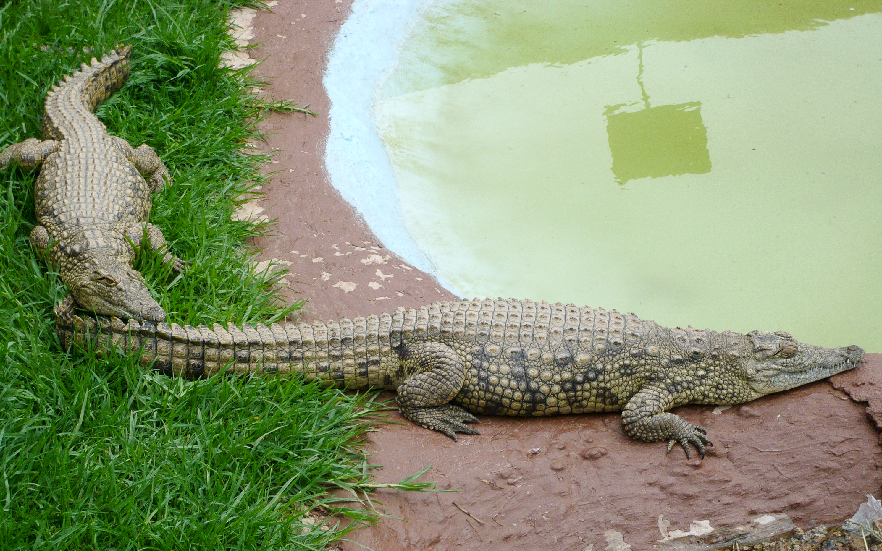 Nile Crocodiles